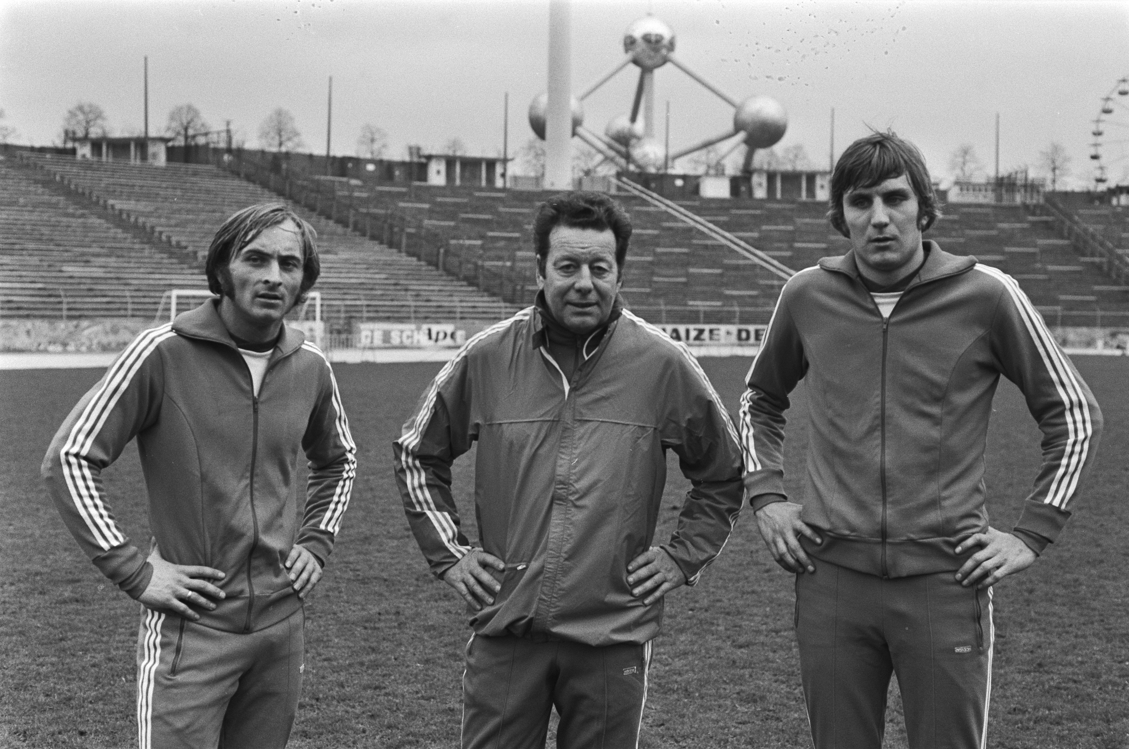 Collectie / Archief : Fotocollectie Anefo Reportage / Serie : Training van het Belgisch nationaal elftal in Brussel Beschrijving : V.l.n.r.: Van Gool, trainer Thijs en Ceulemans. Atomium op de achtergrond Datum : 23 maart 1977 Locatie : België, Brussel Trefwoorden : monumenten, sporttrainingen, trainers, voetbal Persoonsnaam : Ceulemans, Jan, Gool, Roger van, Thijs, Guy Fotograaf : Peters, Hans / Anefo Auteursrechthebbende : Nationaal Archief Materiaalsoort : Negatief (zwart/wit) Nummer archiefinventaris : bekijk toegang 2.24.01.05 Bestanddeelnummer : 929-0879.Het reuzenrad van Meli Heizel.